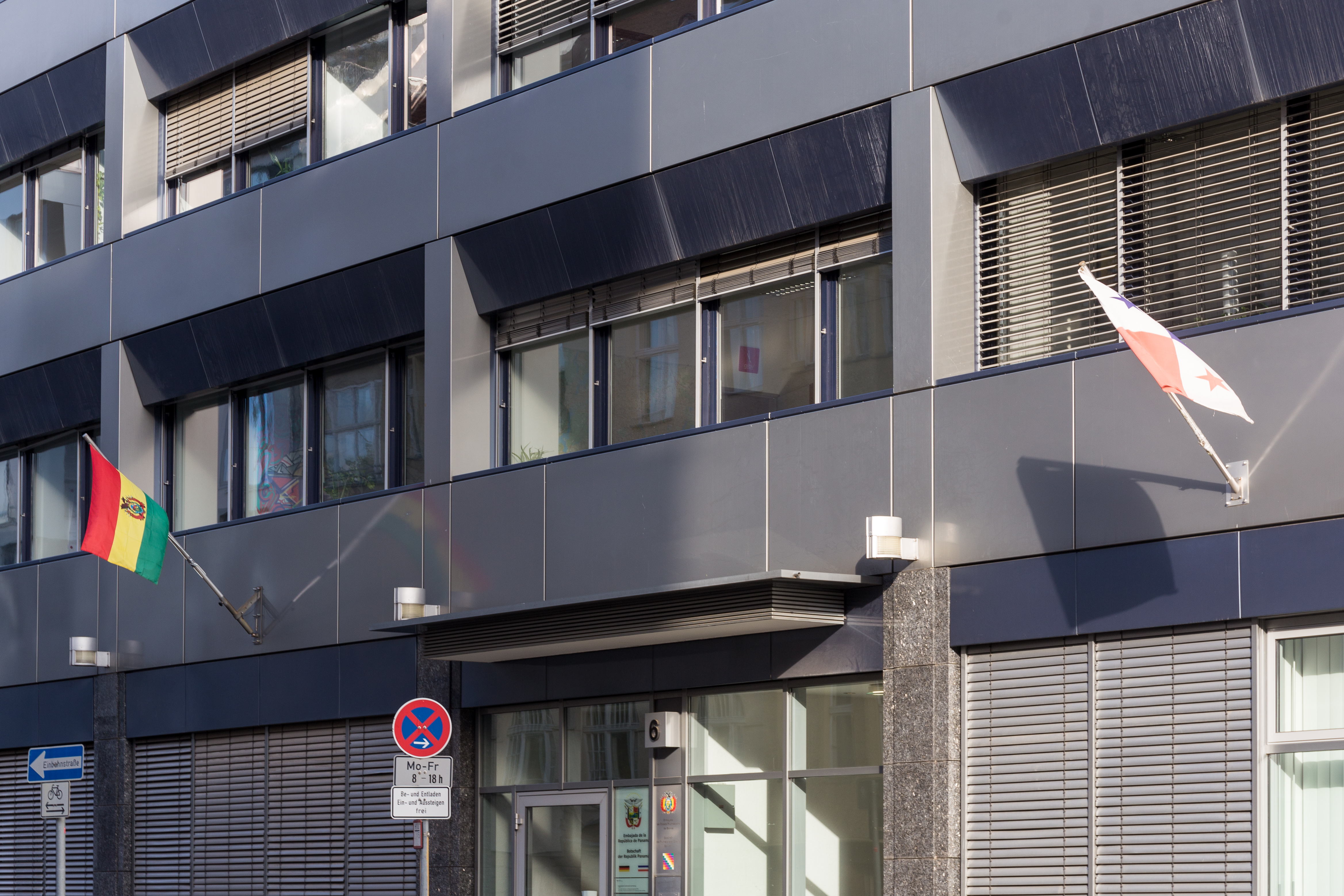 Ambassades de Bolivie et du Panama à Berlin, Wichmannstraße 6.